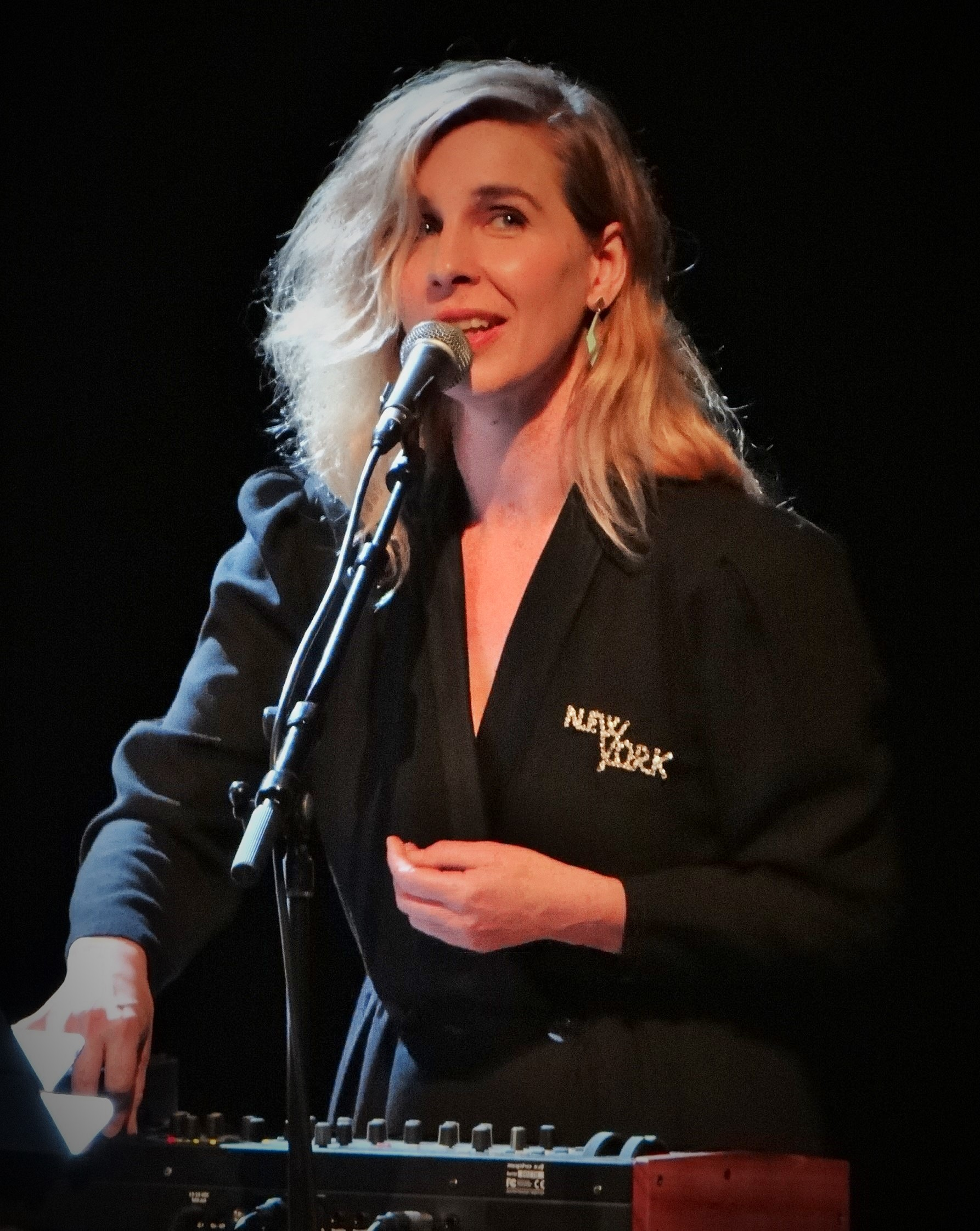 Lady's Folk, Barbara Carlotti, 10 juin 2016 avec le choeur des collèges des Hauts de Seine (groupe sud) au Centre d'Art et de Culture de Meudon